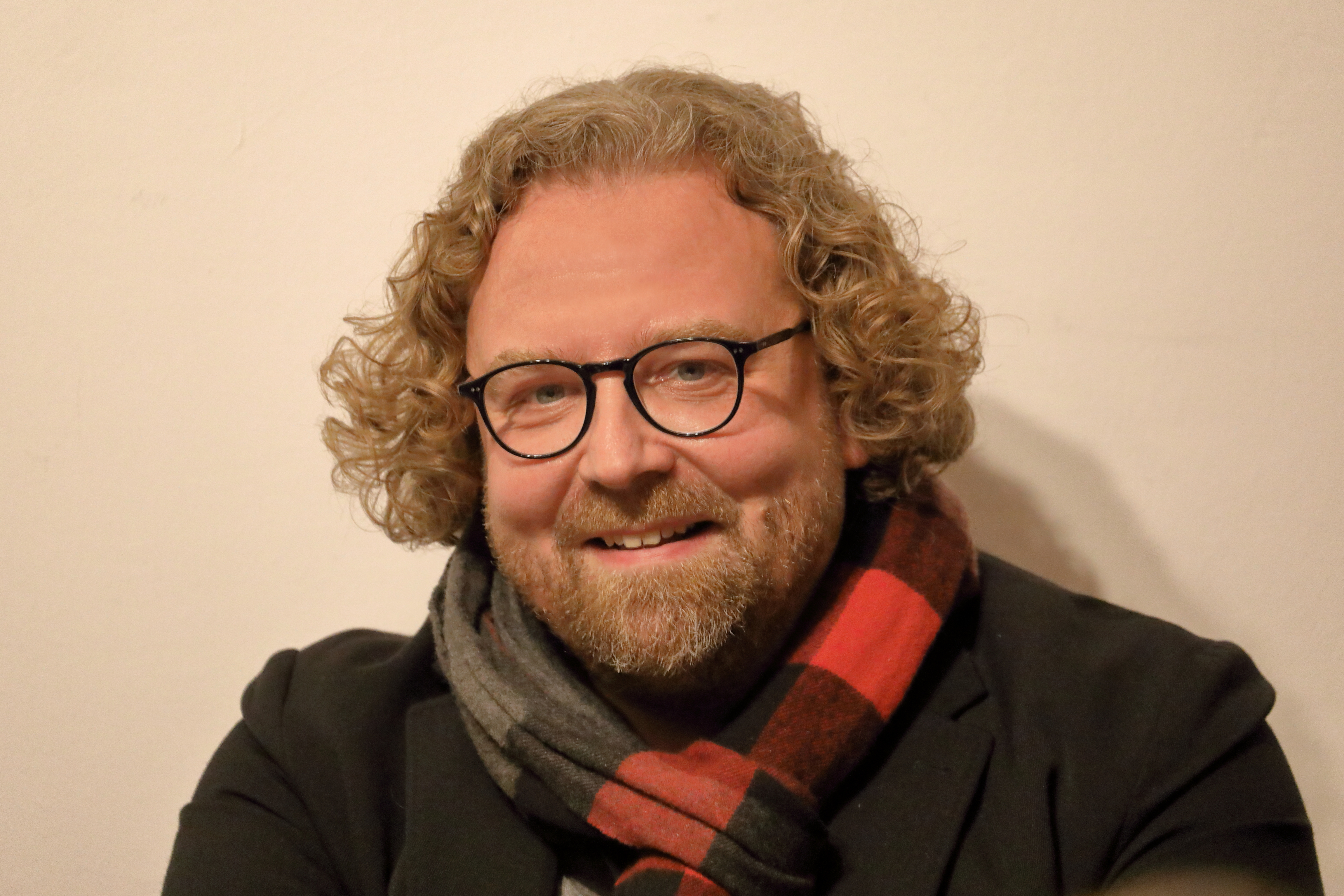 Der deutsche Historiker Dirk Rupnow bei der Veranstaltung „HGM-neudenken“ der Plattform „Textfeld Südost“ im Arsenal, Objekt 1, im 3. Wiener Gemeindebezirk Landstraße.